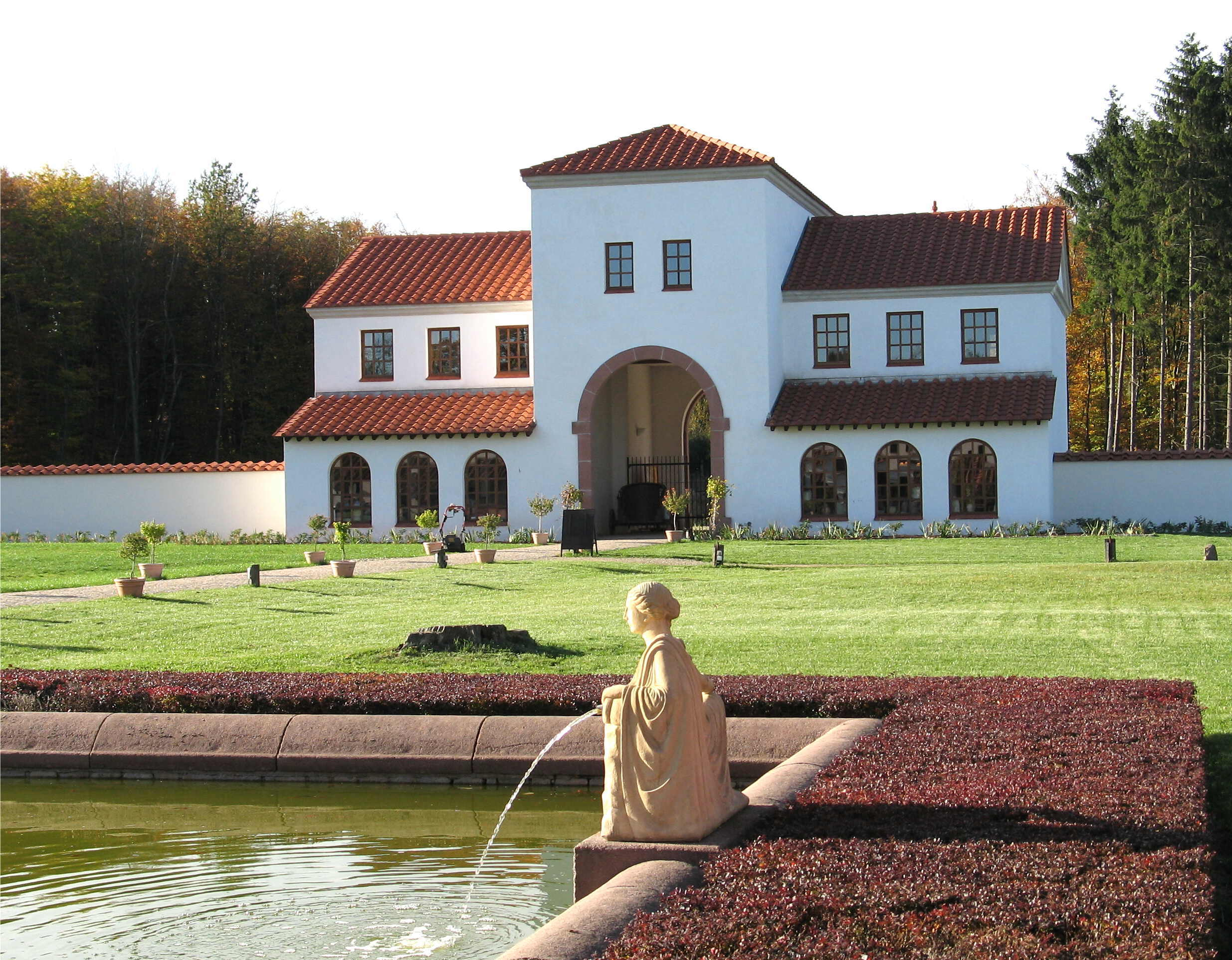 D'Entreesgebäi vun der réimescher Villa zu Borg